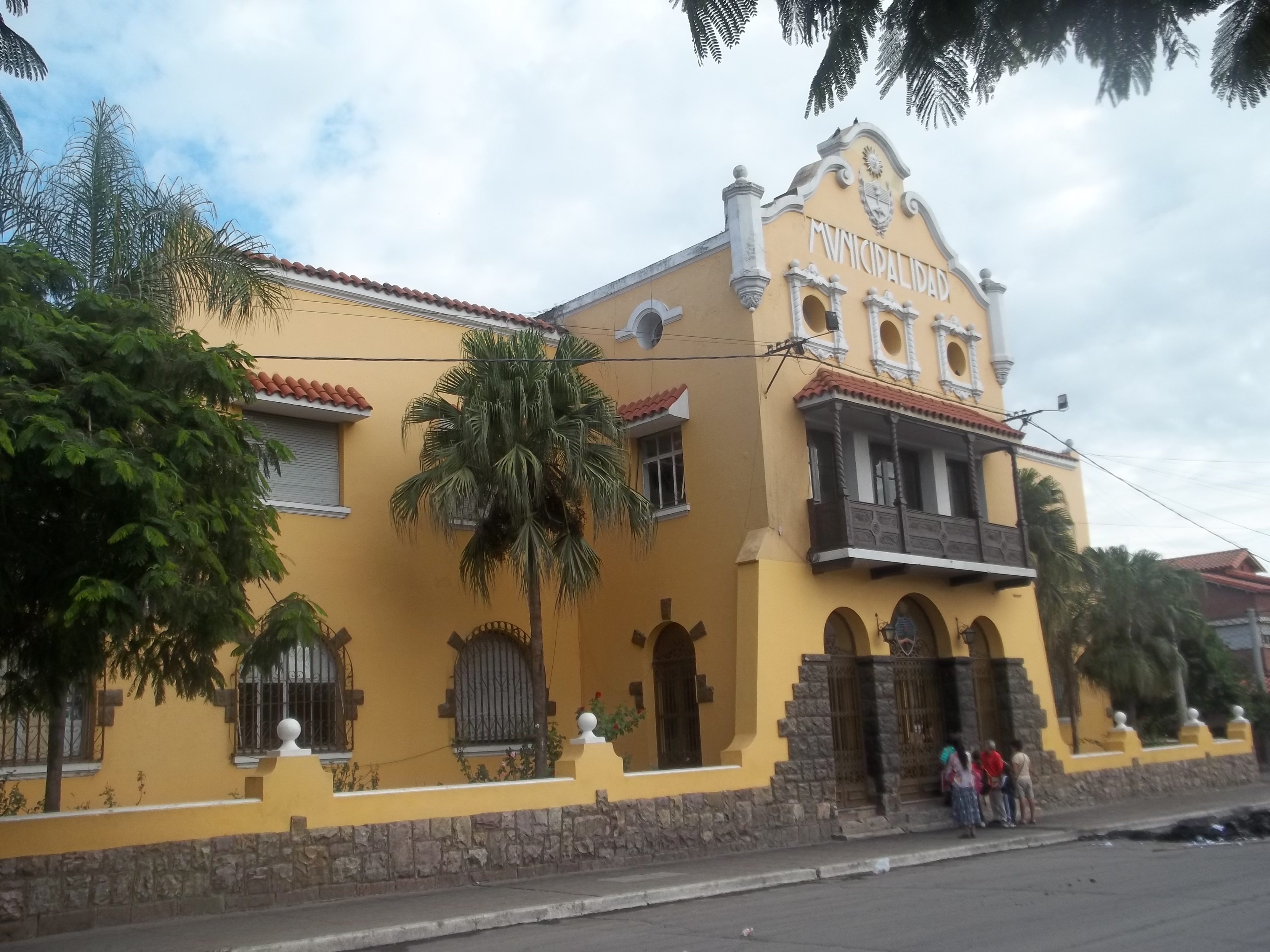 Vista desde el lateral izquierdo de la Municipalidad de San Pedro de Jujuy, frente a la plaza Belgrano.